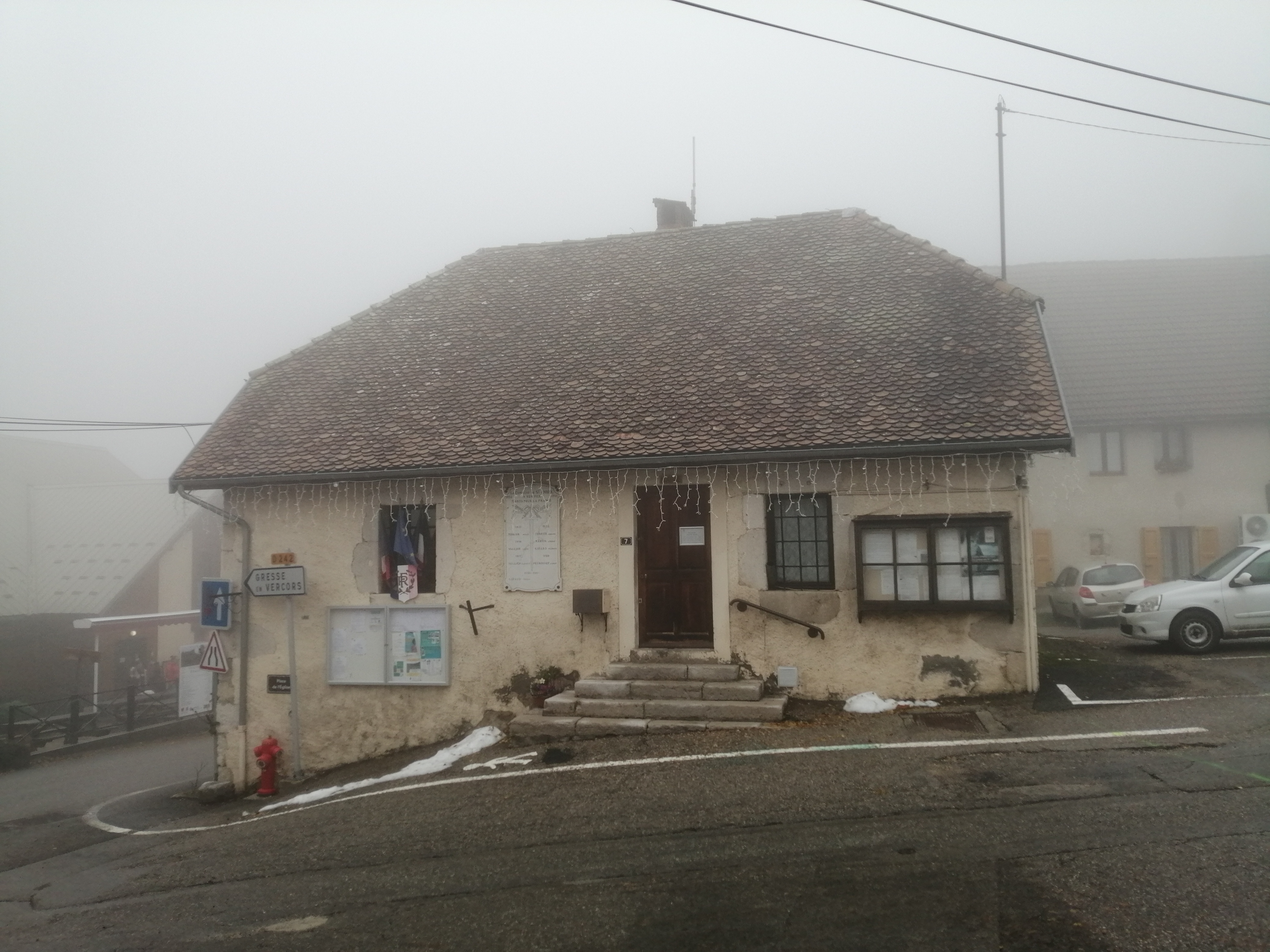 mairie de Saint-Andéol, Isère, France.